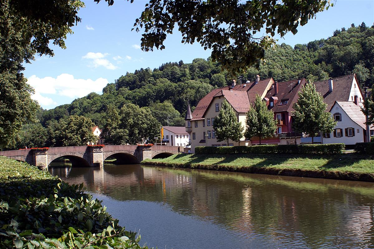 Sulz am Neckar